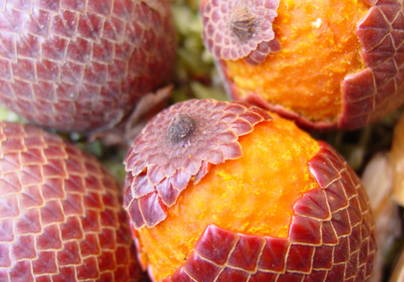 Frutos do Buriti (Mauritia flexuosa-Palmae)